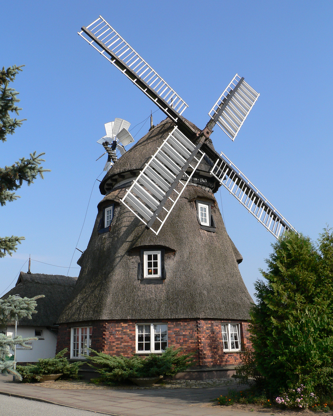 Holländer-Windmühle Dorf Mecklenburg